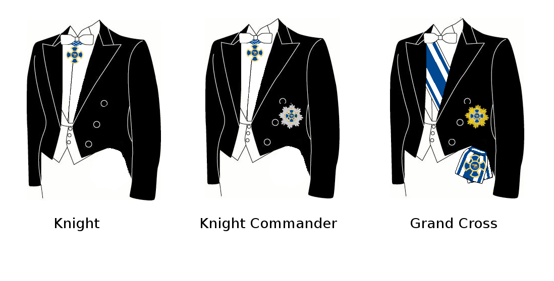 Tragweise -Royal Order of the Elephant (Godenu)